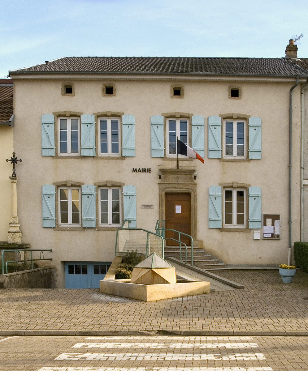 Mairie de la commune de Condé-Northen